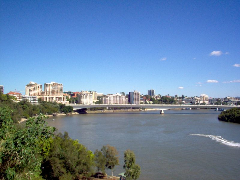 Le fleuve Brisbane dans la ville de Brisbane et le pont Capitaine Cook